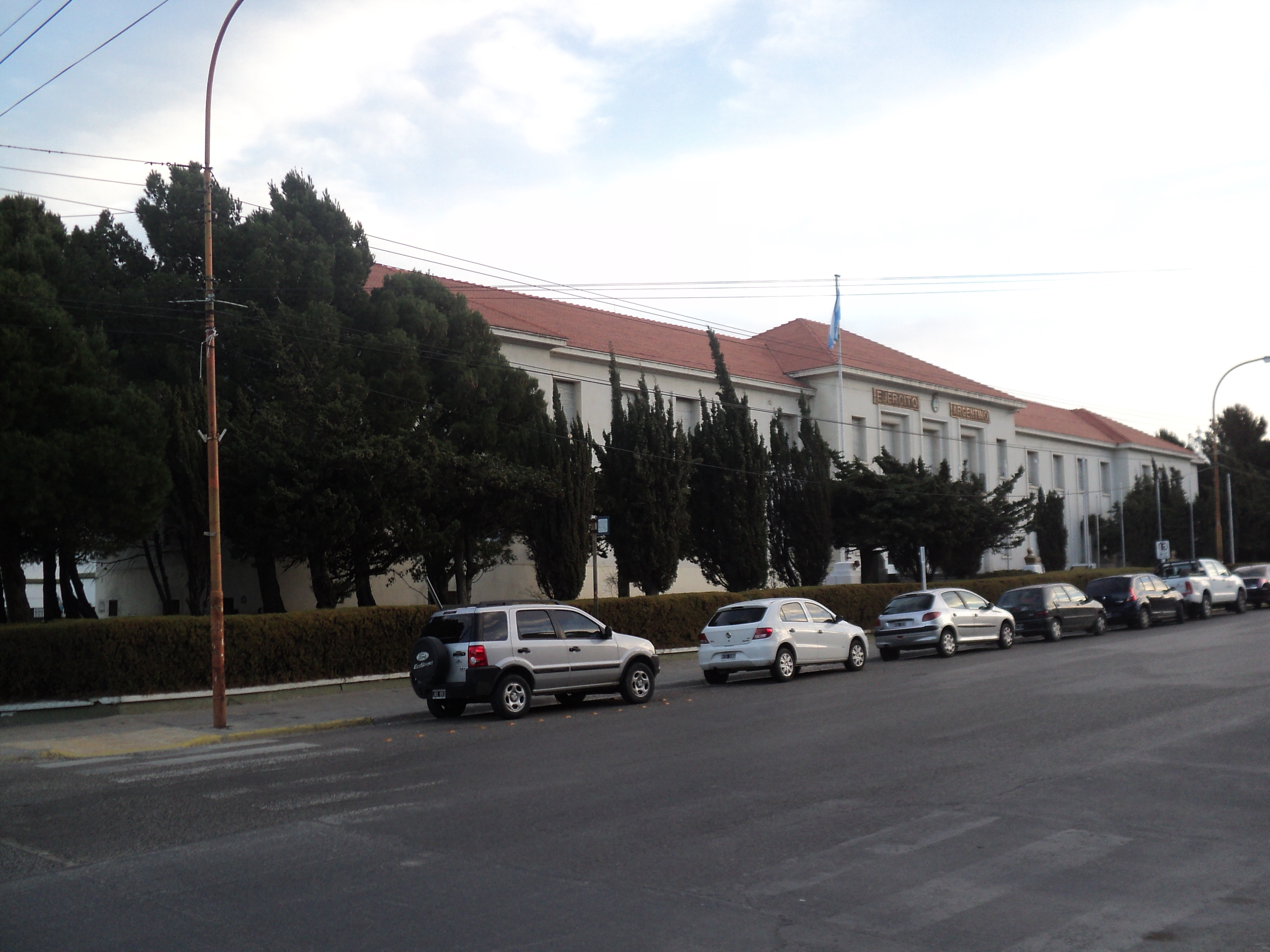 Edificio del Comando en pleno centro de la ciudad, en el pasado albergó las oficinas administrativas de la Gobernación Militar de Comodoro Rivadavia